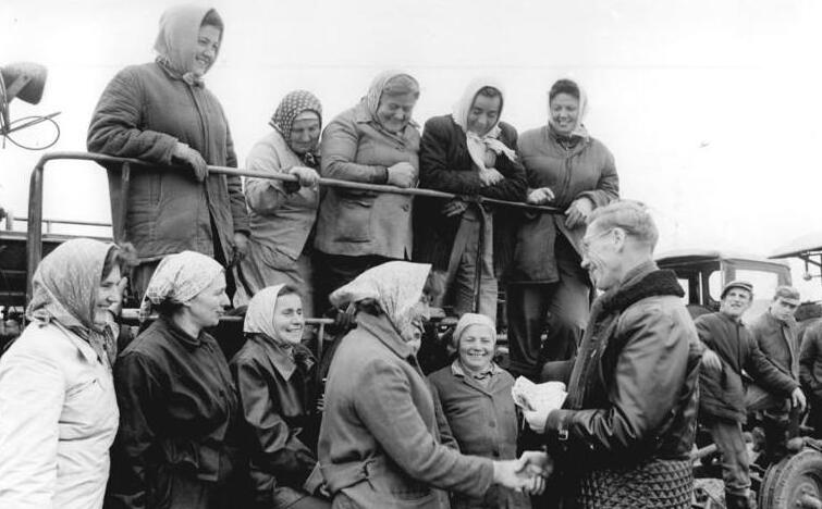 LPG Strehla-Paußnitz, Auszeichnung einer Brigade Zentralbild Siegert kn 28.9.1966 Dresden: Auszeichnung auf dem Kartoffelschlag In der Kreisgruppe I des Bezirkes Dresden ging der Kreis Riesa bei der Kartoffelrodung als Sieger hervor. Beste Komplexbrigade wurde die Kooperationsgemeinschaft der LPG Strehla-Paußnitz. Genosse Thomas von der Produktionsleitung des Kreises Riesa übergibt an die Frauen der Komplexbrigade eine Prämie von 400, - MDN, die hier die Genossenschaftsbäuerin Karich entgegen nimmt. Die beiden Kombines dieser Kooperationsgemeinschaft arbeiten in zwei Schichten und erzielen täglich eine Leisung von 6 ha bei bester Qualität. Für ihre ausgezeichneten Leistungen wurde diese Brigade ausserdem von Bezirkslandwirtschaftsrat mit einer Prämie geehrt.